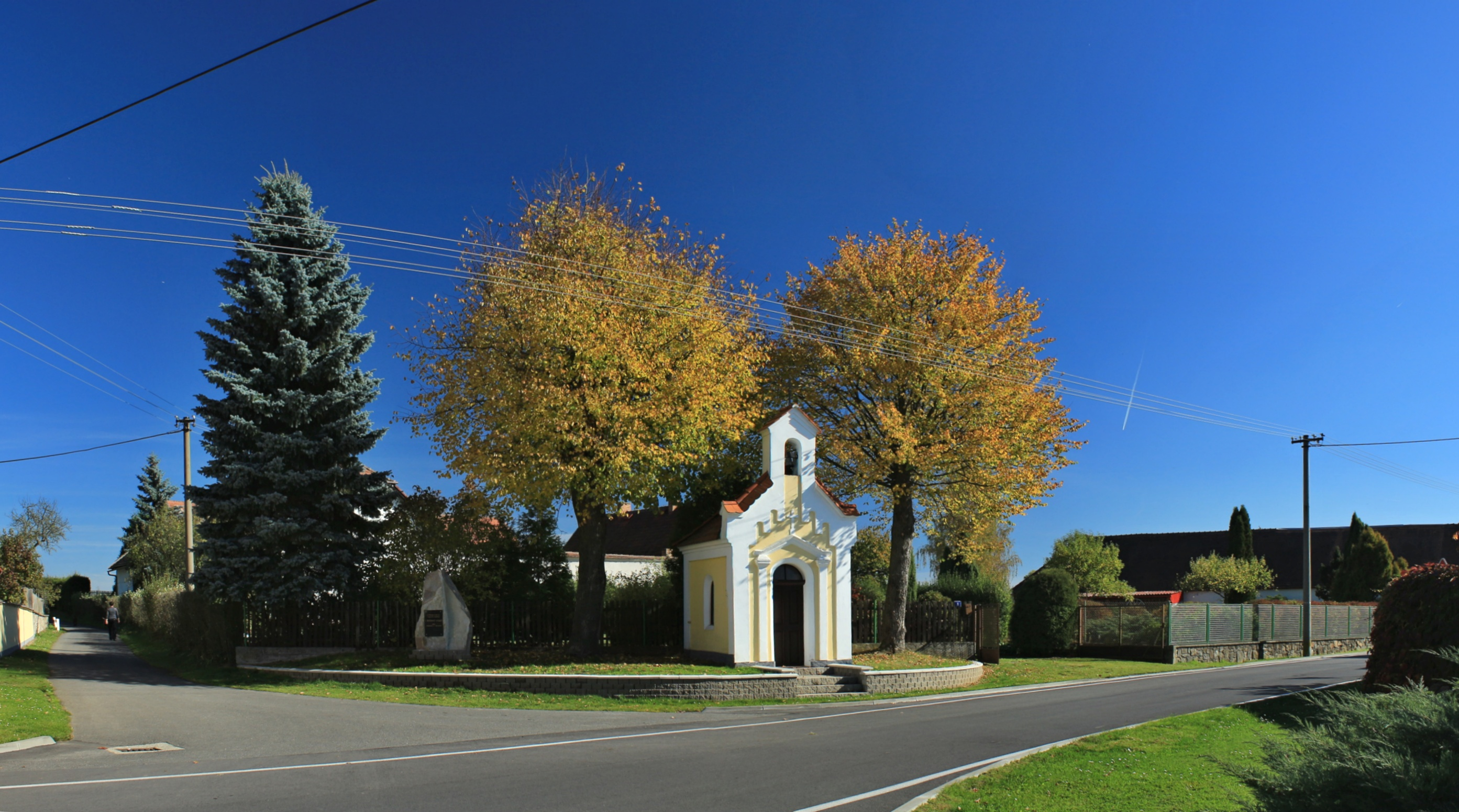 Dobronice, horní náves s kapličkou